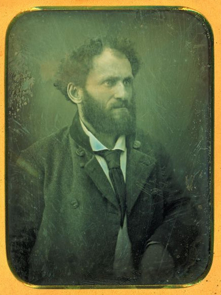 Porträt des Schriftstellers Friedrich Gerstäcker (1816-1872)